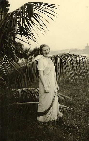 Die Aufnahme aus dem Jahre 1956 zeigt Lieselotte Hachmann im Botanischen Garten von Kalkutta